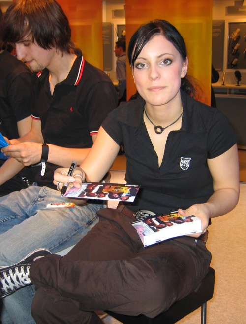 Sängerin Stefanie Kloß bei einer Autogramm-Stunde auf der Musikmesse Frankfurt 2005